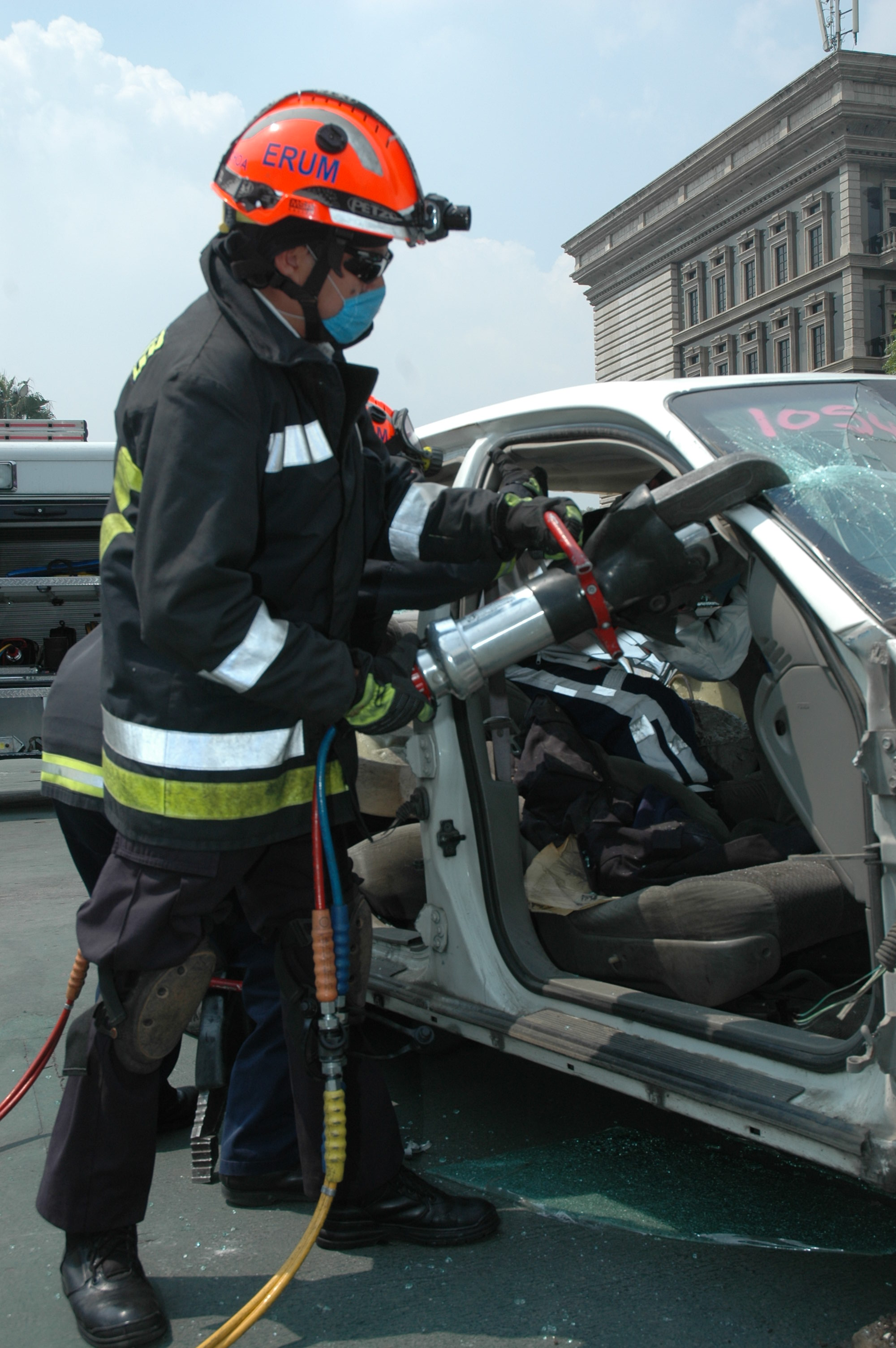 1 Quitar techo usando las herramientas hidráulicas de rescate durante una demonstración del Escuadrón de Rescate y Urgencias Médicas de la Ciudad de México en ITESM Campus Ciudad de México